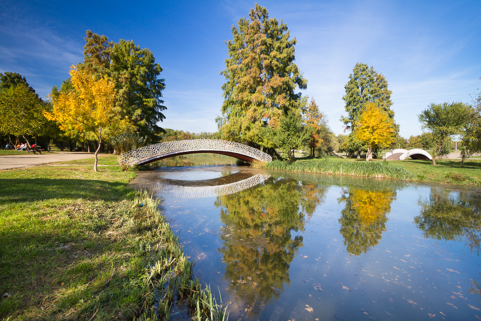 Parcul Tineretului, Bucuresti